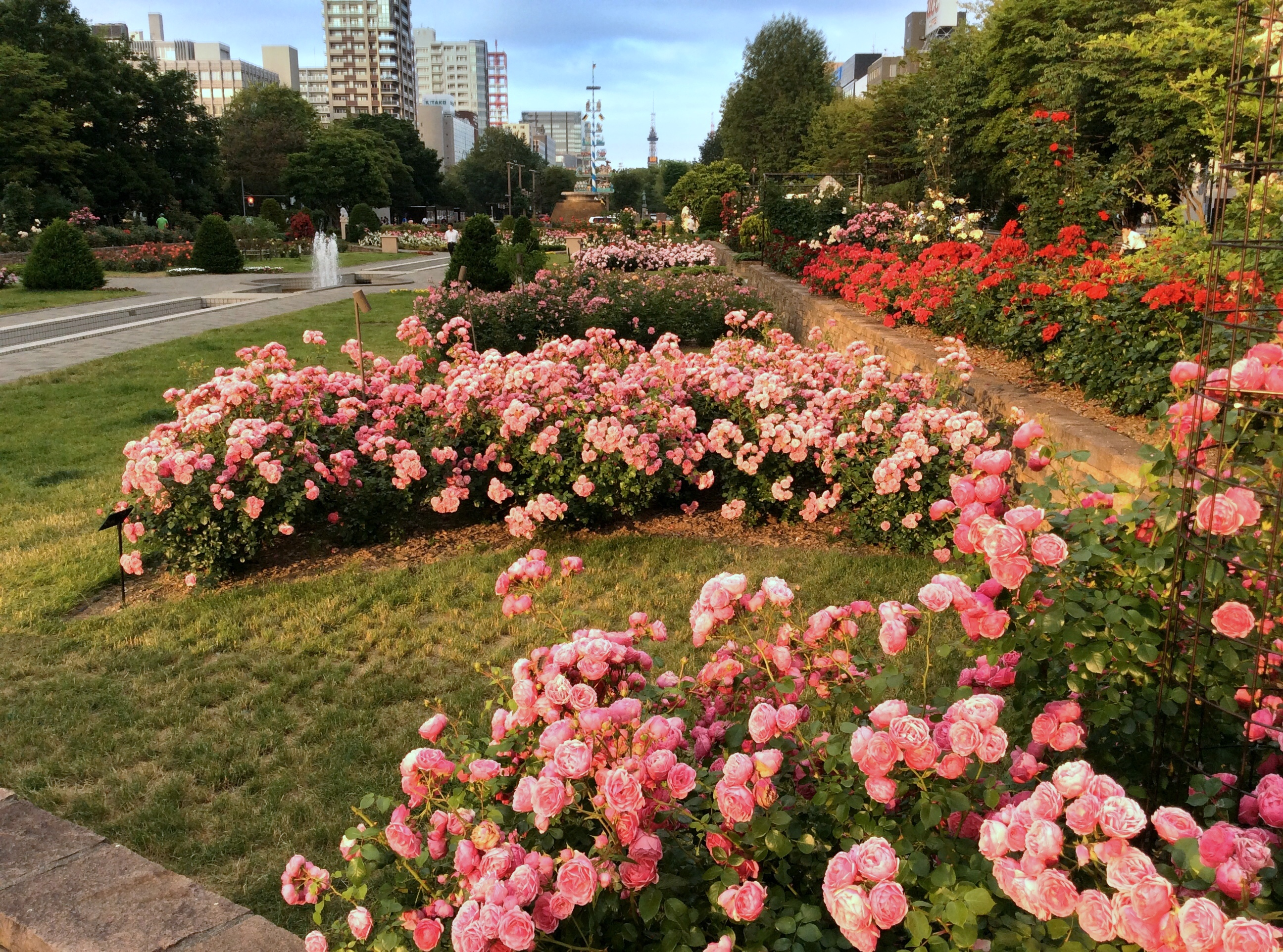 サンクンガーデン（Sunken Garden）